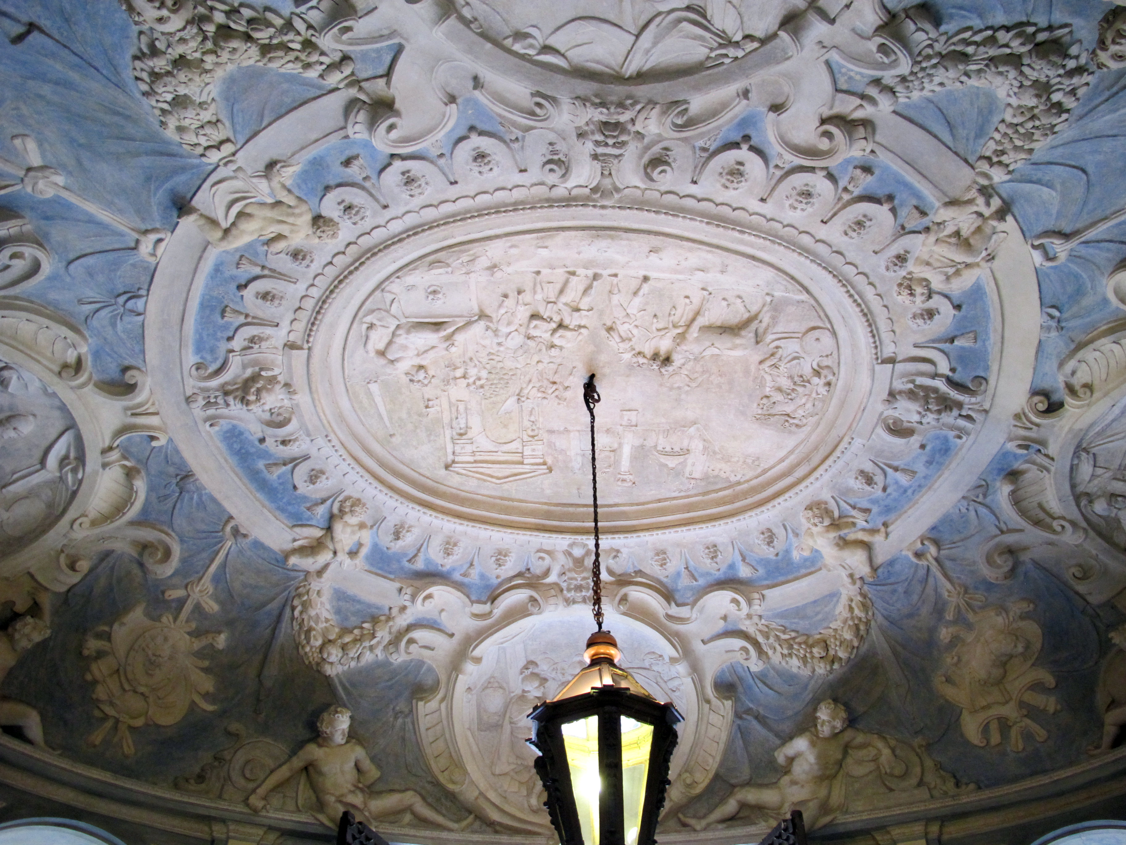 Genova, Liguria